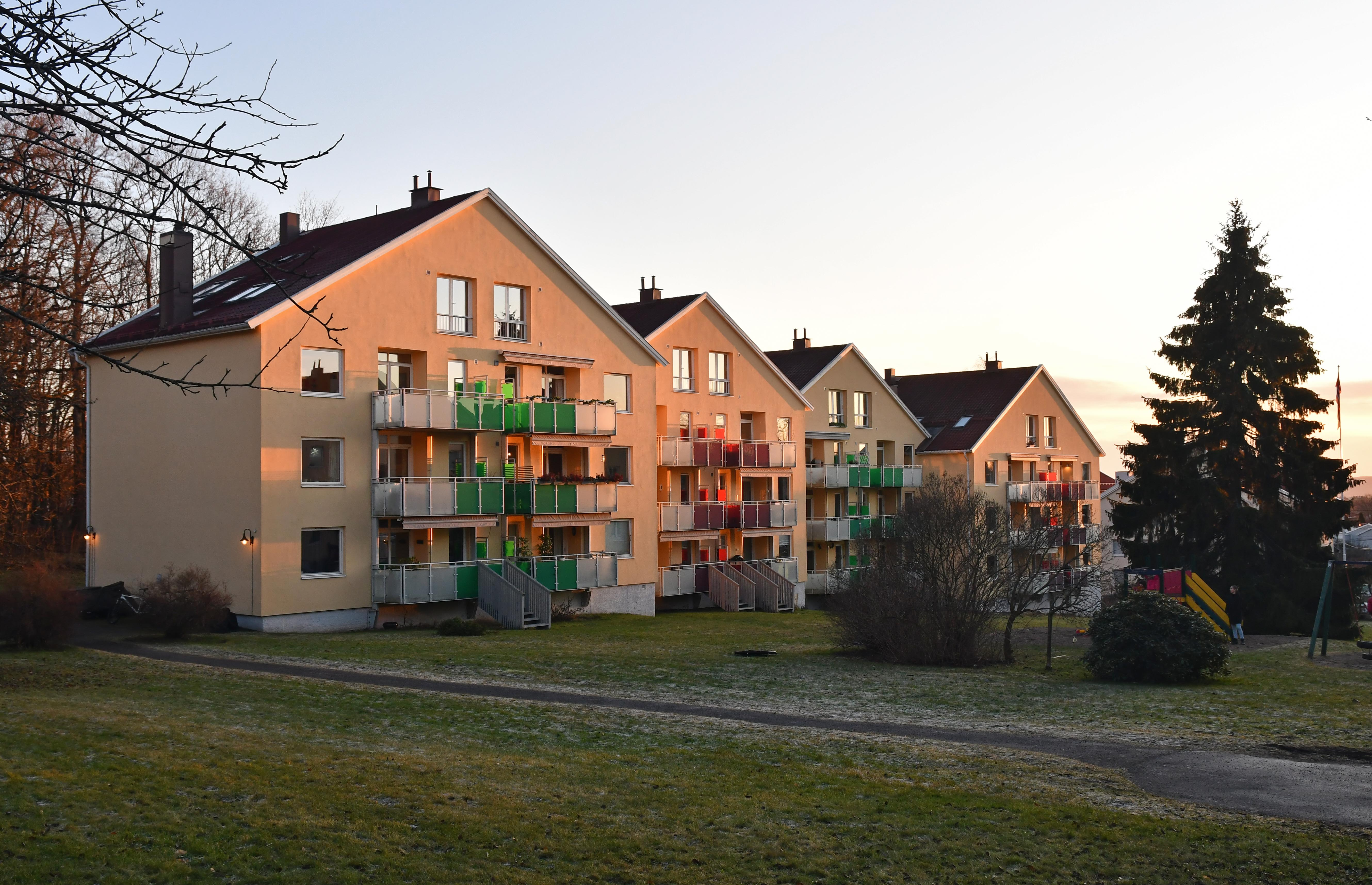 Boliger i Christophers vei 10 til 16 på Tåsen, Oslo, januar 2020